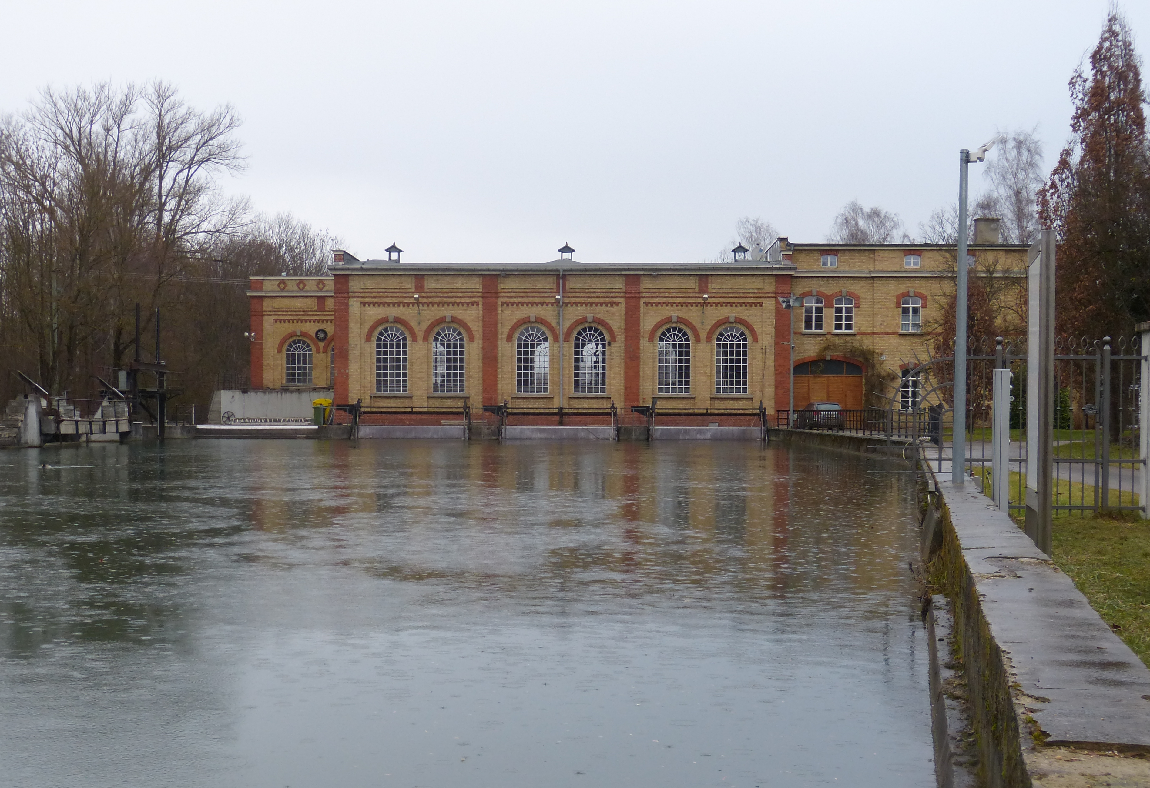 Das Ende des Auslaufkanals am Wasserkraftwerk Wolfzahnau in Augsburg.